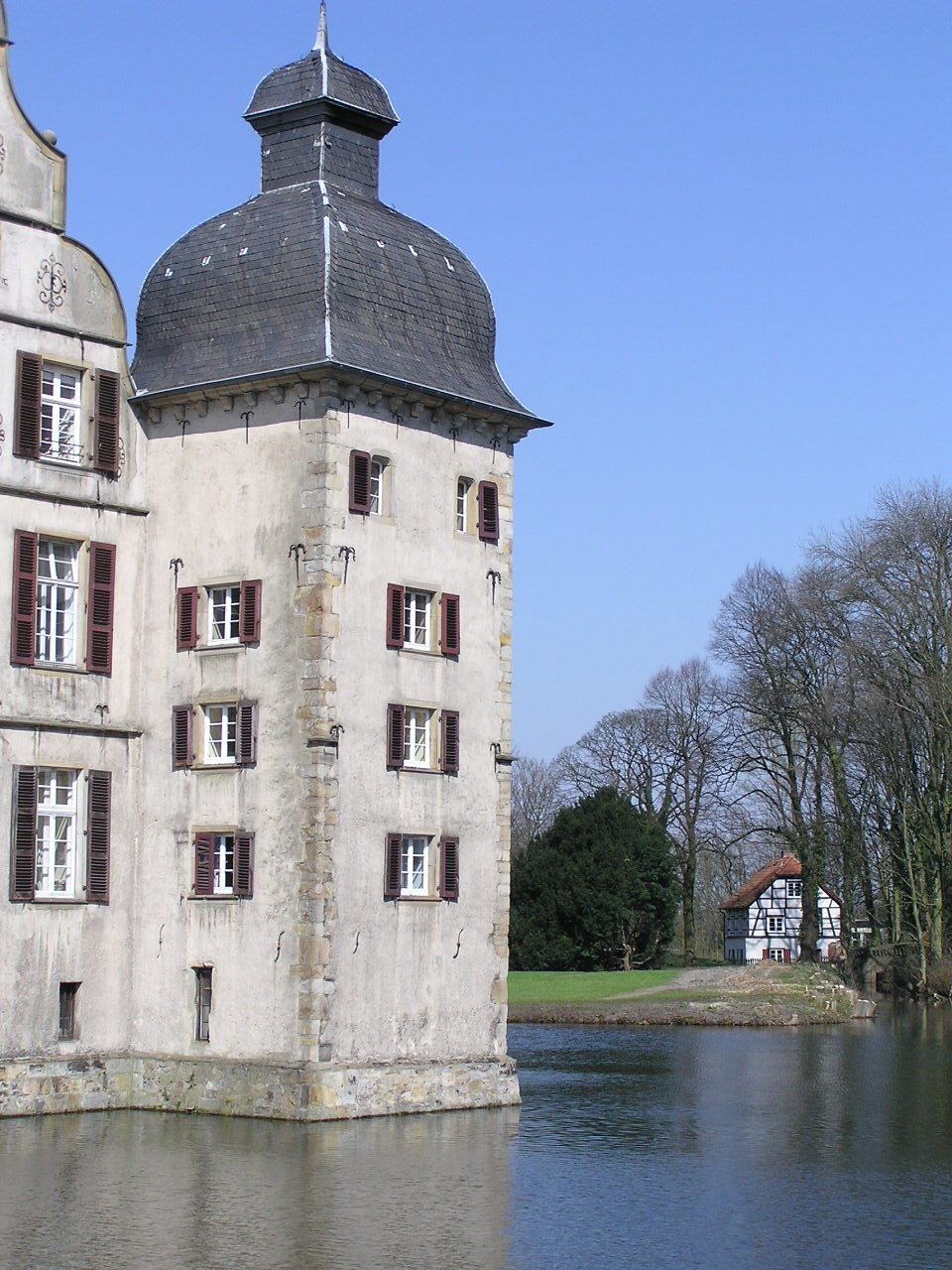 Wasserschloss Haus Bodelschwingh in Dortmund-Bodelschwingh